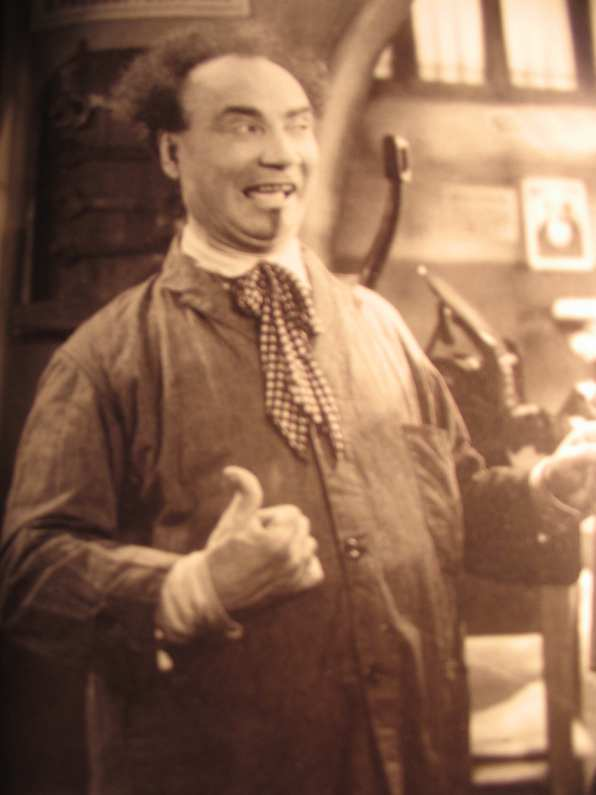 Angelo Musco da «Fiat voluntas dei»